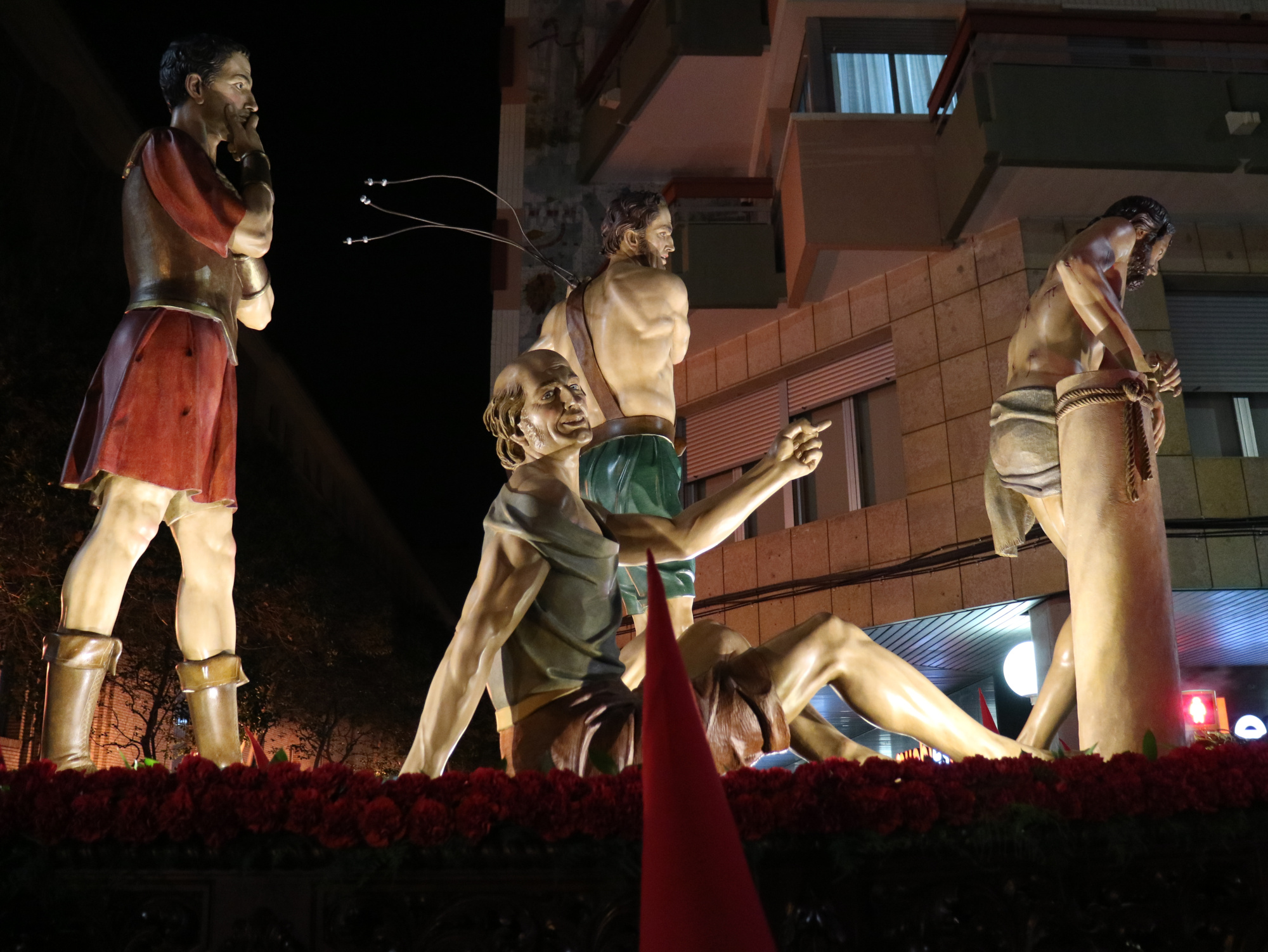 Paso de la flagelación. Real, Pontificia, Antiquísima, Ilustre, Franciscana y Penitencial Hermandad y Cofradía del Señor Atado a la Columna y de Nuestra Señora de la Fraternidad en el Mayor Dolor